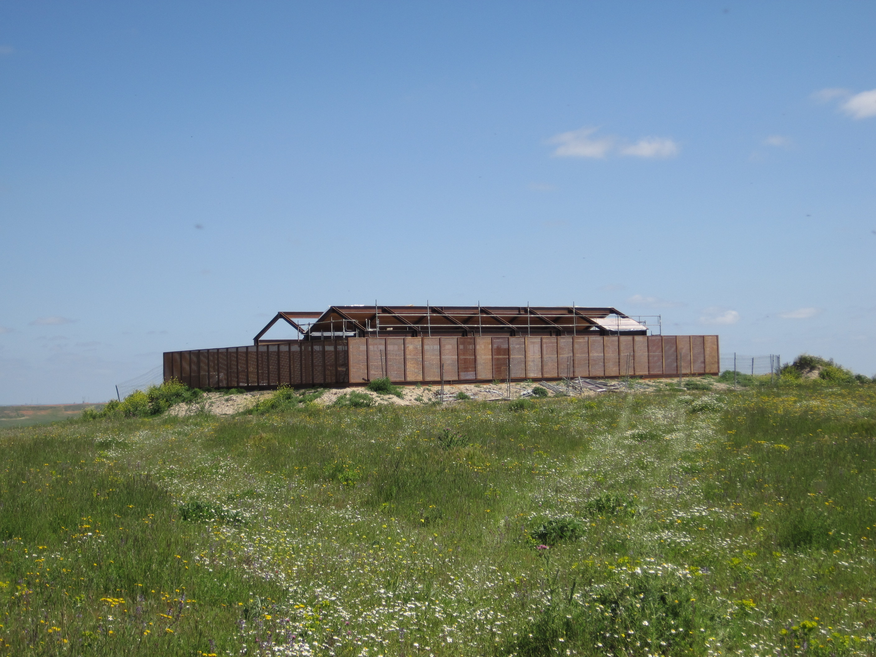 Cubierta de las cisternas romanas de Molacillos (Zamora, España), todavía en obras.